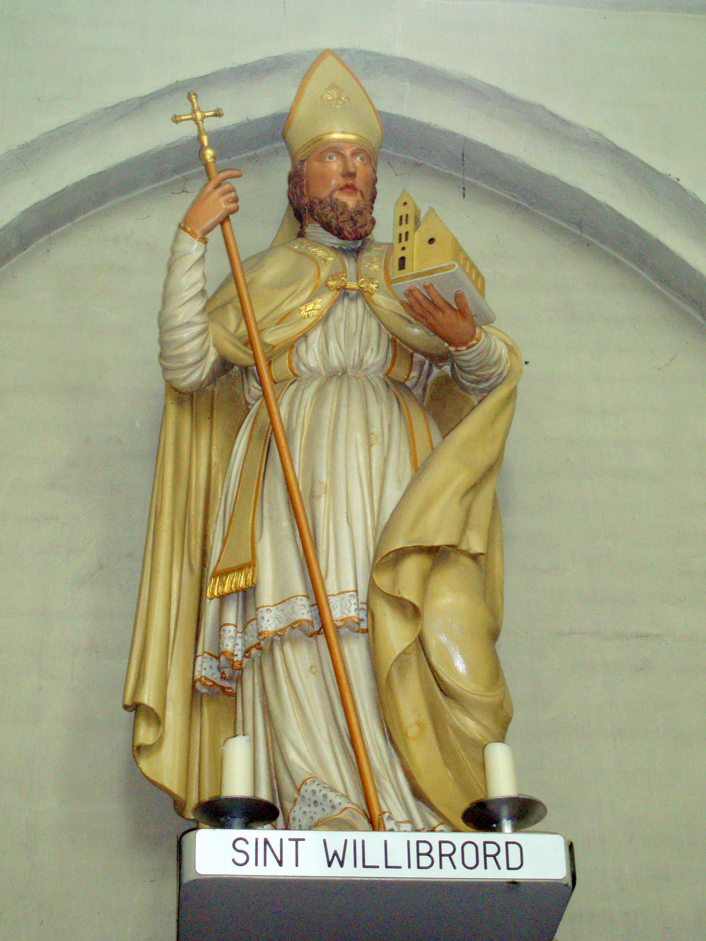 Beeld van Sint-Willibrord in de Basiliek van Onze-Lieve-Vrouw-Tenhemelopneming te Zwolle